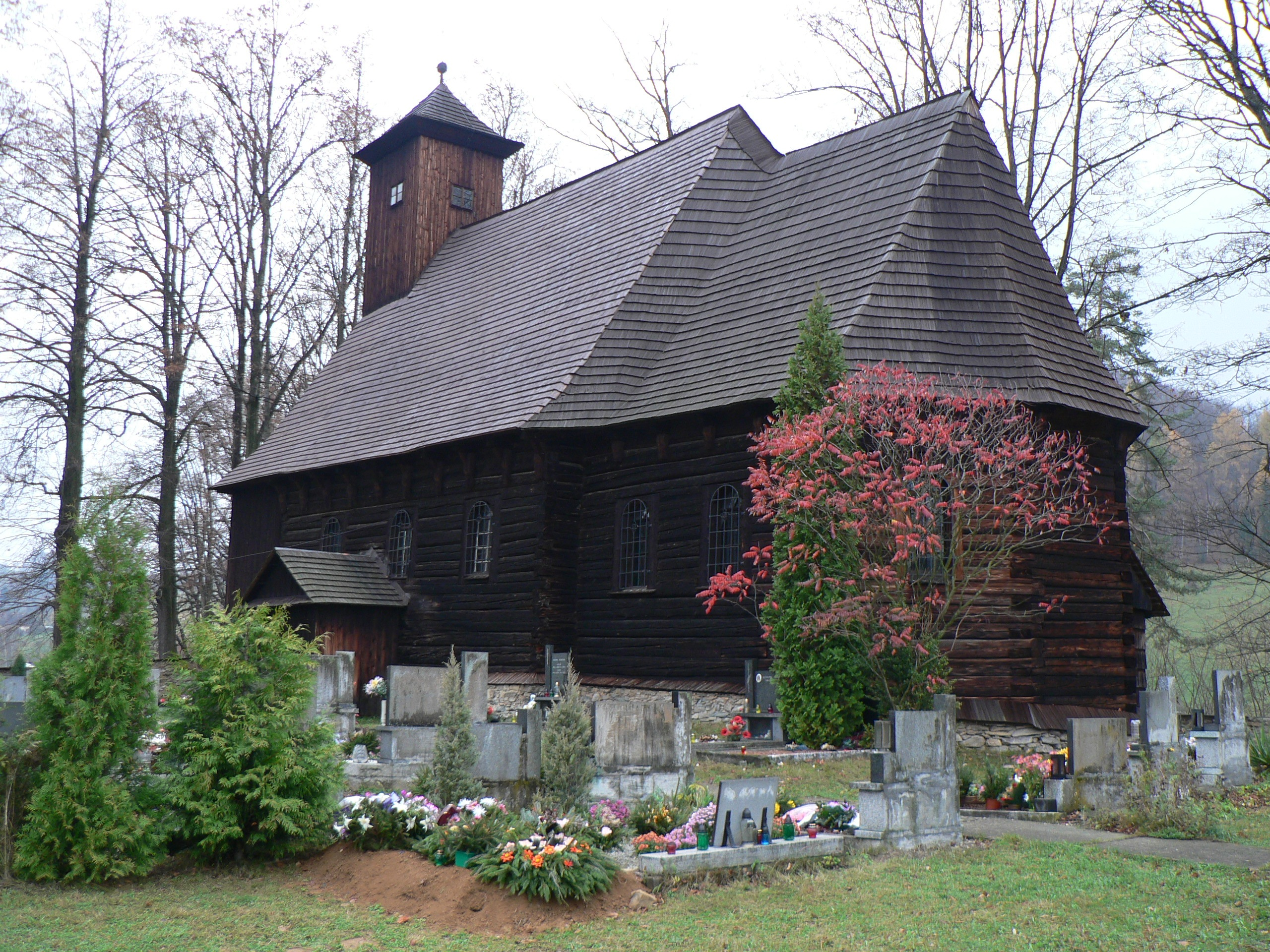 Kostel svatého Martina (Žárová)